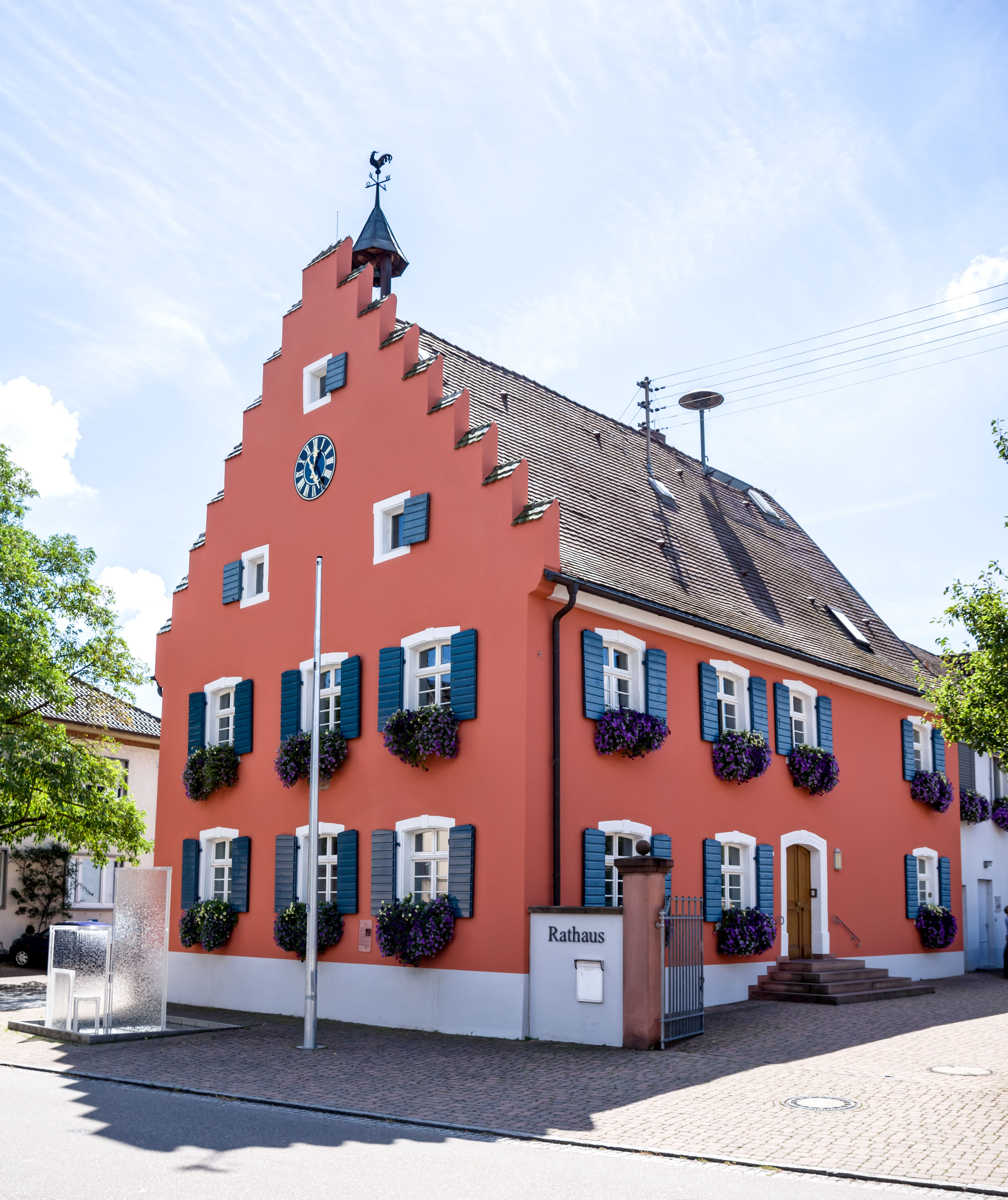 Bilder aus Gottenheim Das Rathaus